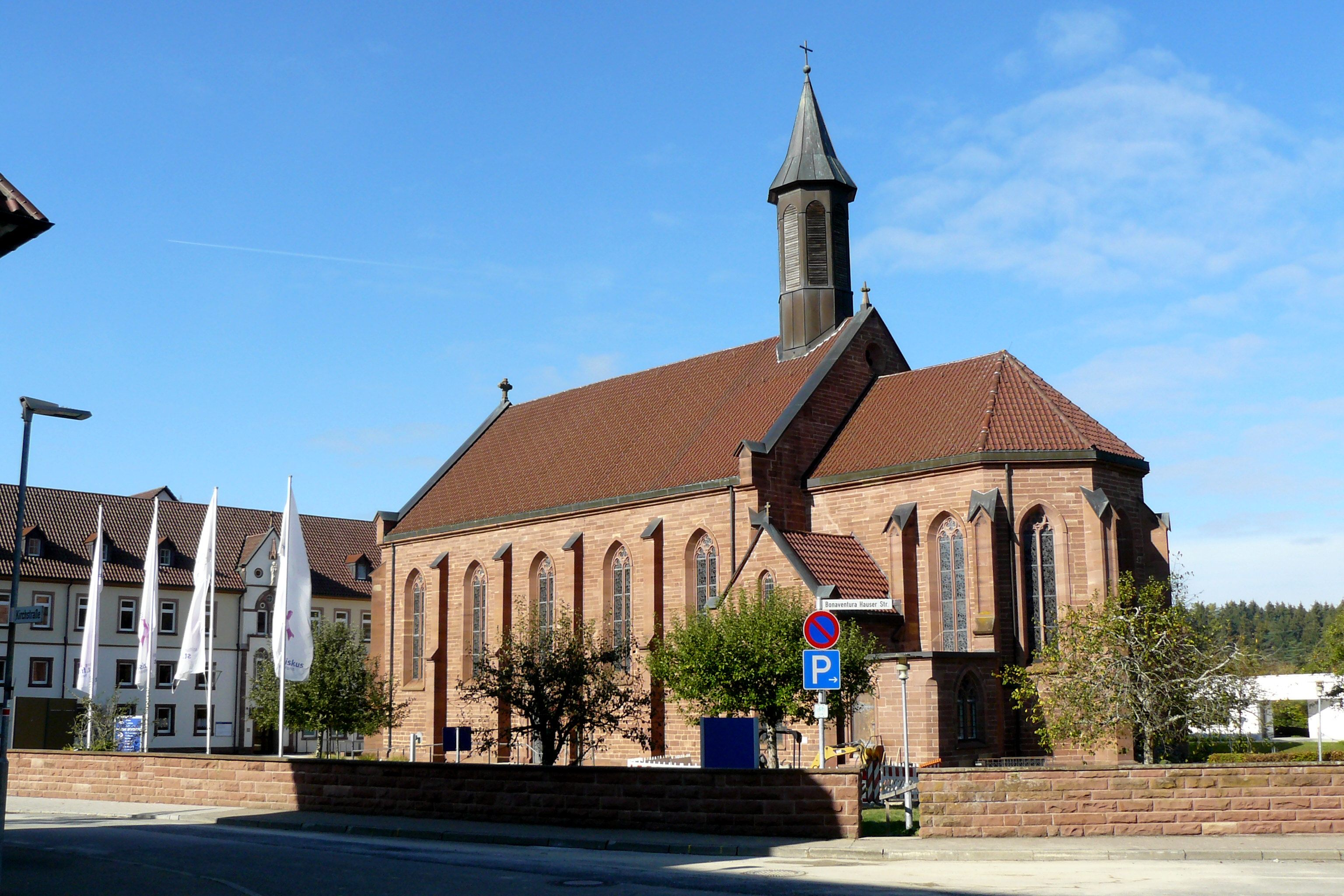 Kloster Heiligenbronn - Wallfahrtskirche St. Gallus